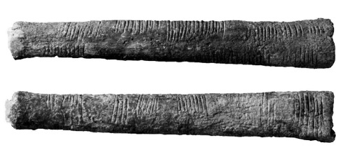 Osso di Ishango